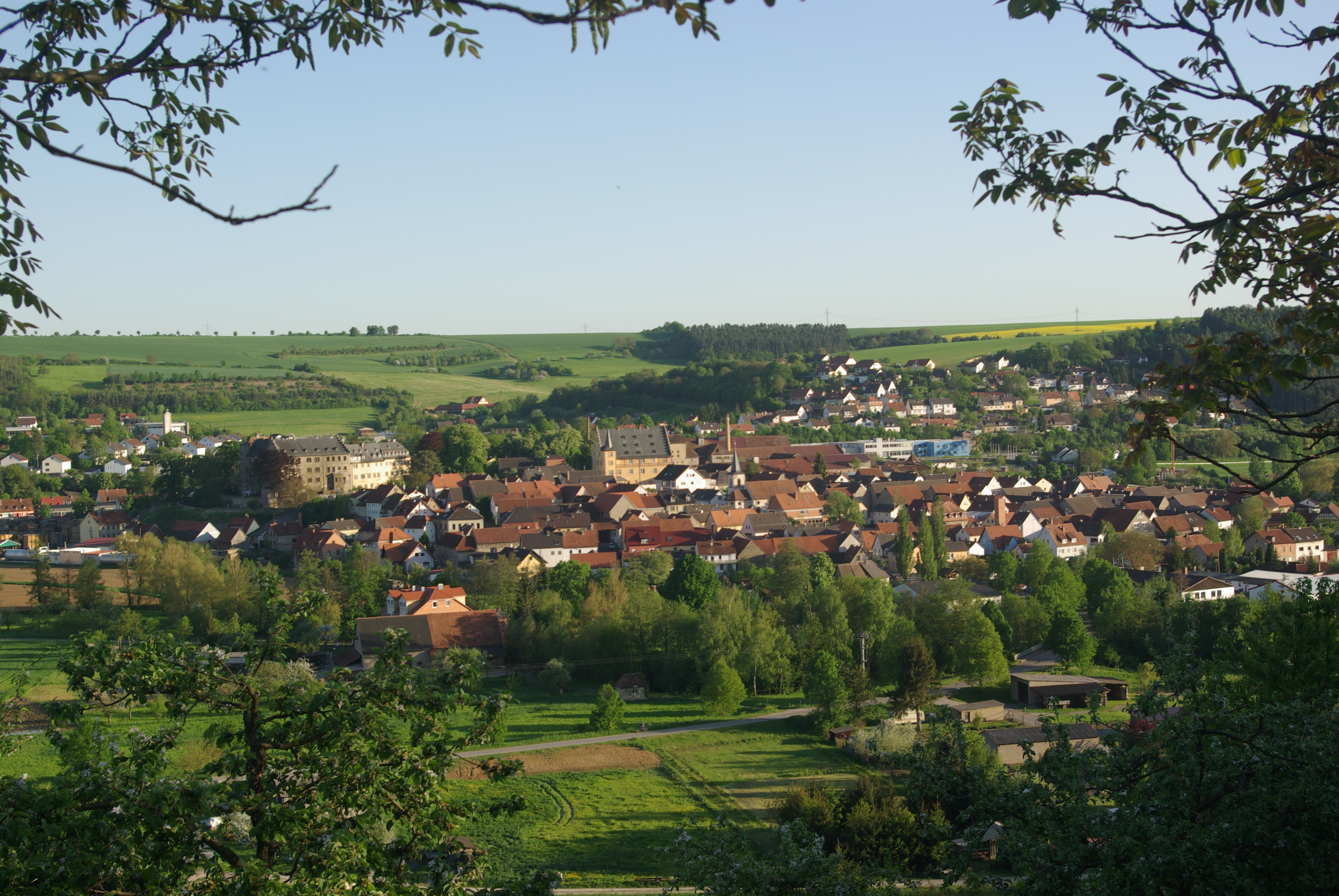 Ansicht des Ortes Thüngen (vom Weinberg)